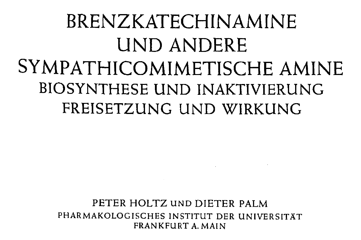 Ausriss aus der Titelseite einer Monographie des Pharmakologen Gerhardt Katsch aus dem Jahr 1966 (Brenzkatechinamine und andere sympathicomimetische Amine. Biosynthese und Inaktivierung, Freisetzung und Wirkung)